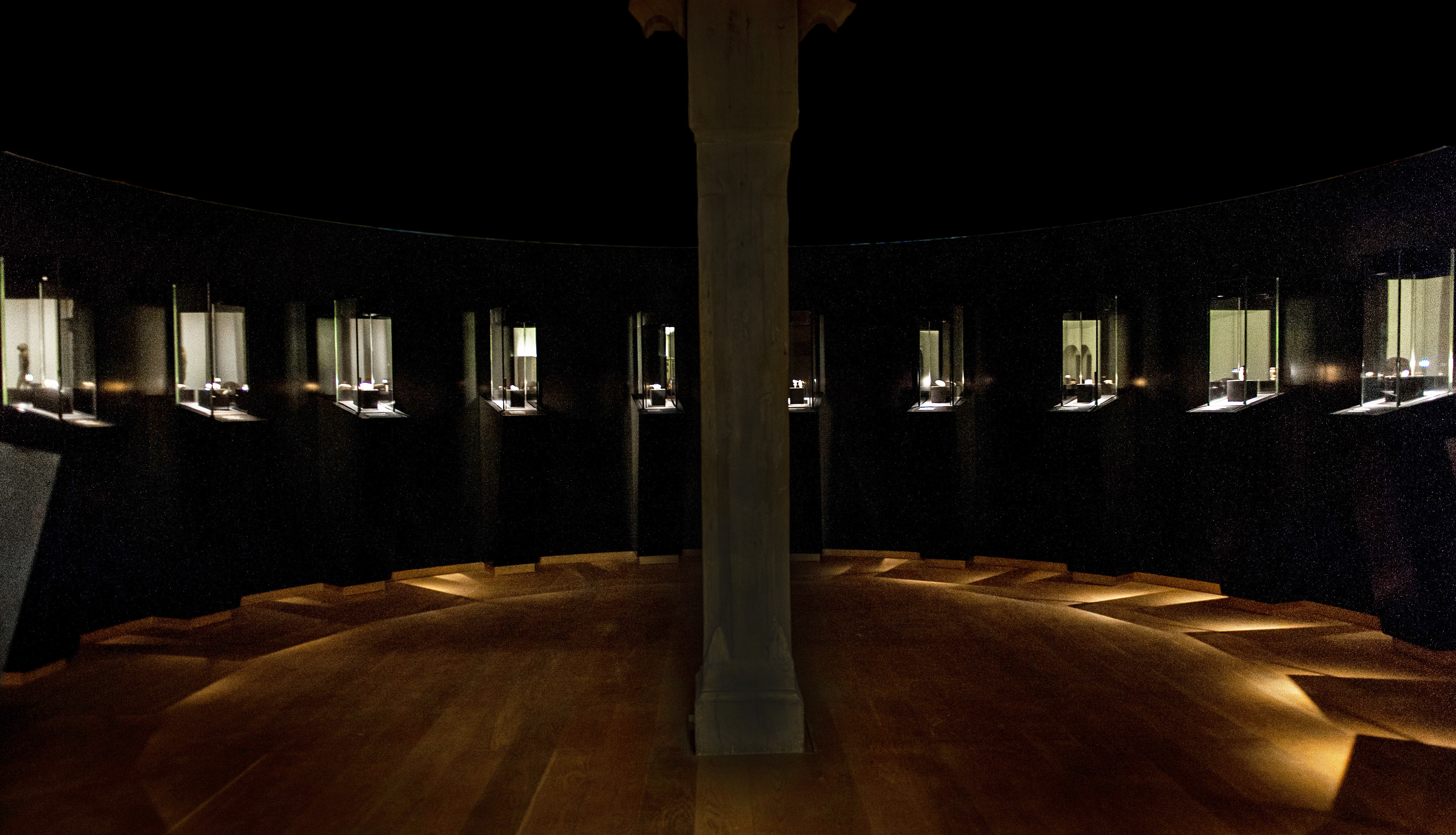 Raum mit Eiszeitfiguren und -flöten auf Schloss Hohentübingen